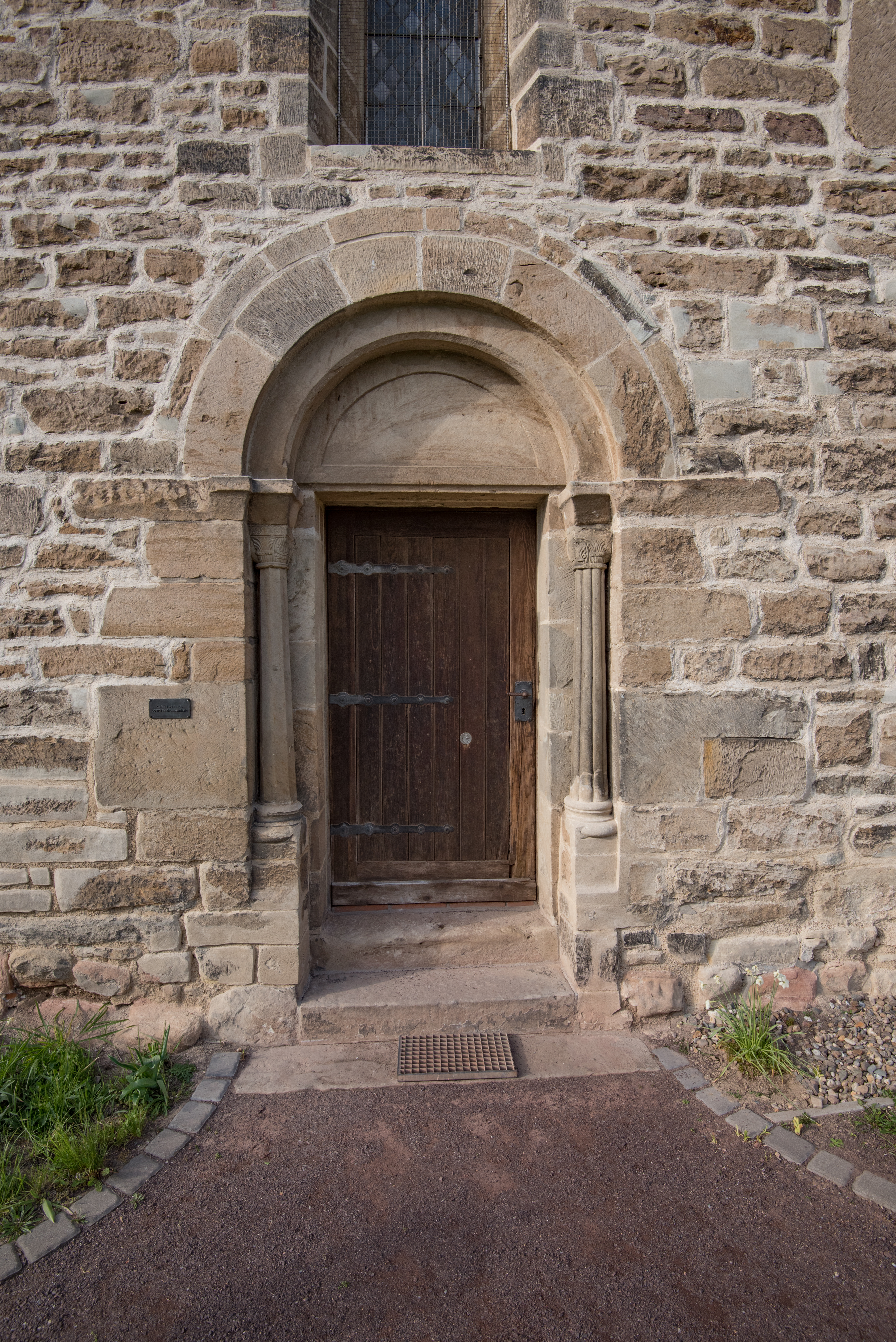 Bernburg, Weinberg, St. Stephanus